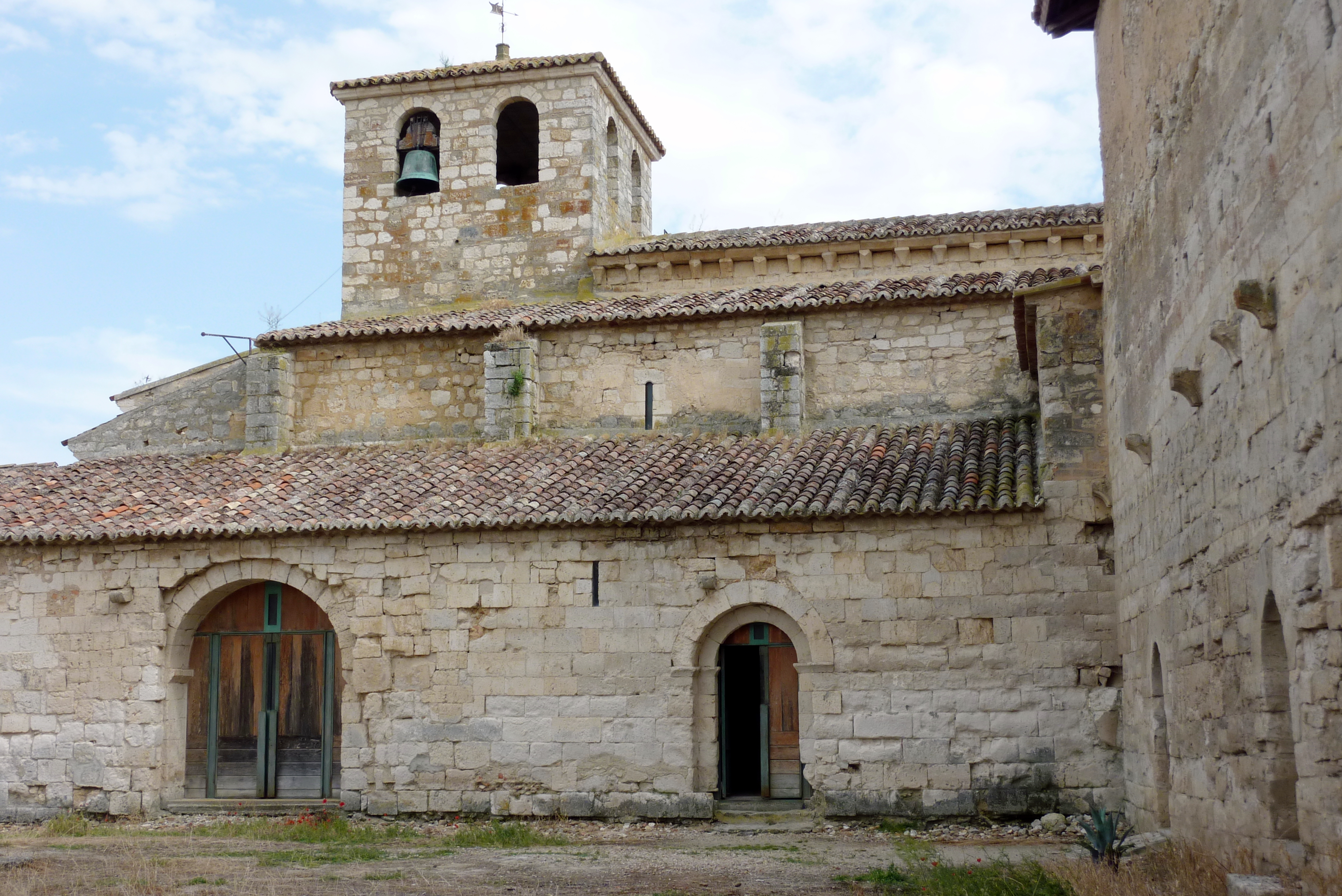 Katholische Kirche Santa María de Wamba in Wamba in der spanischen Provinz Valladolid (Castilla y León)